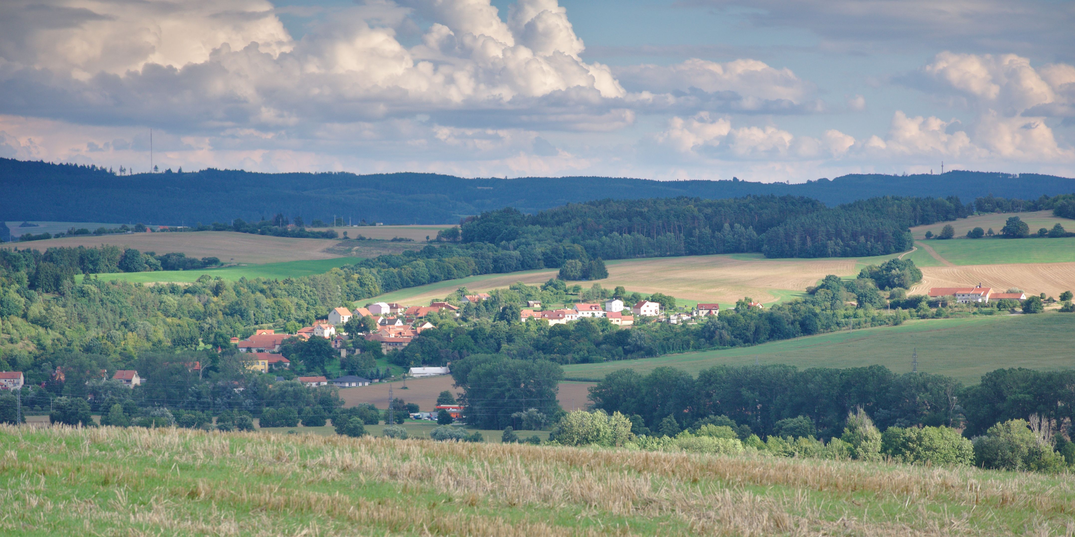 Pohled na obec od severozápadu, Krhov, okres Blansko